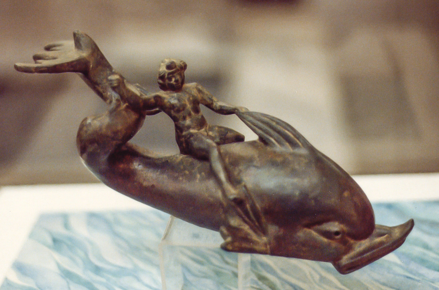 Eros auf dem Delphin, Ephesus-Museum Selçuk, Westtürkei